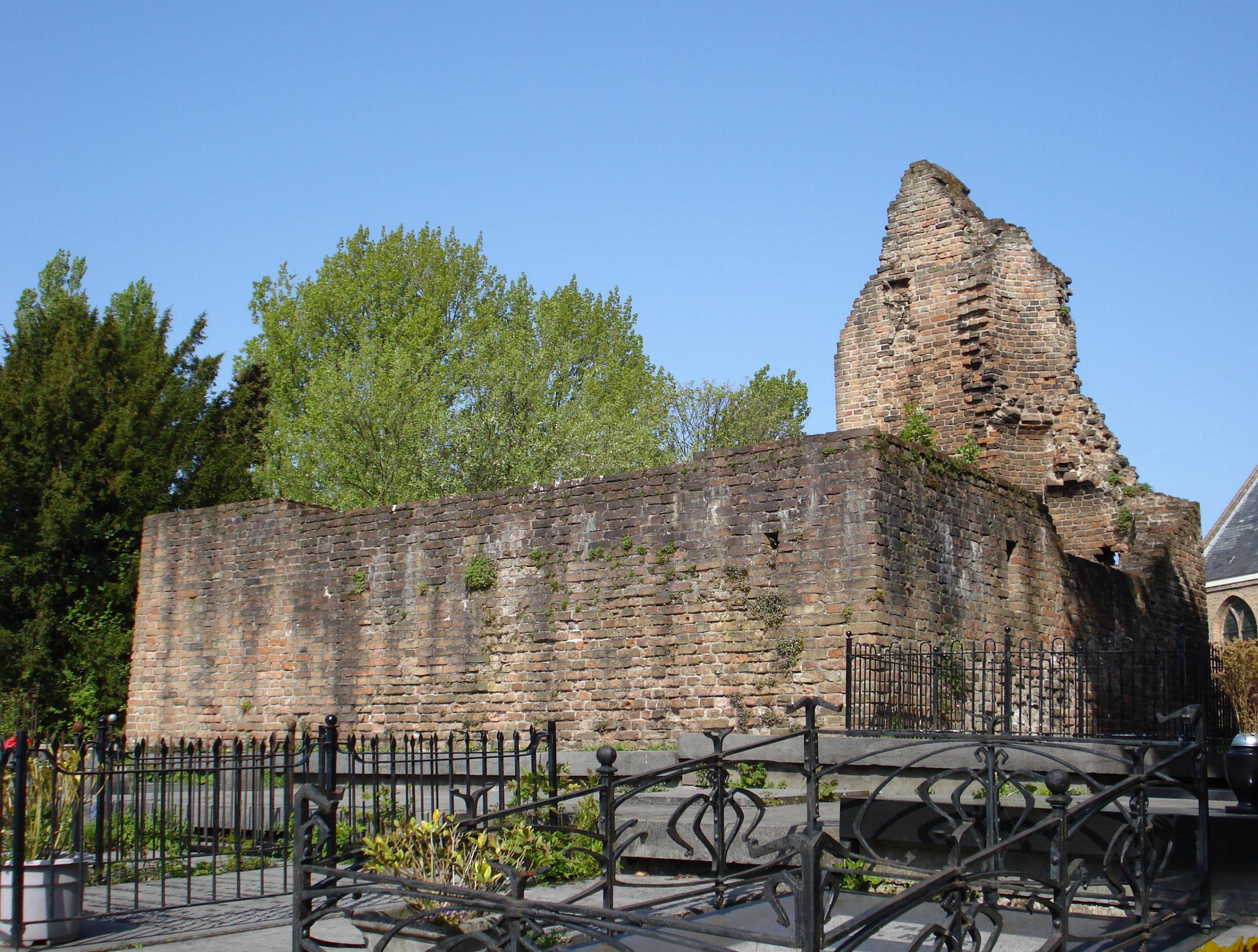 Rotterdam, slotruine Hillegonda. Rijksmonument.